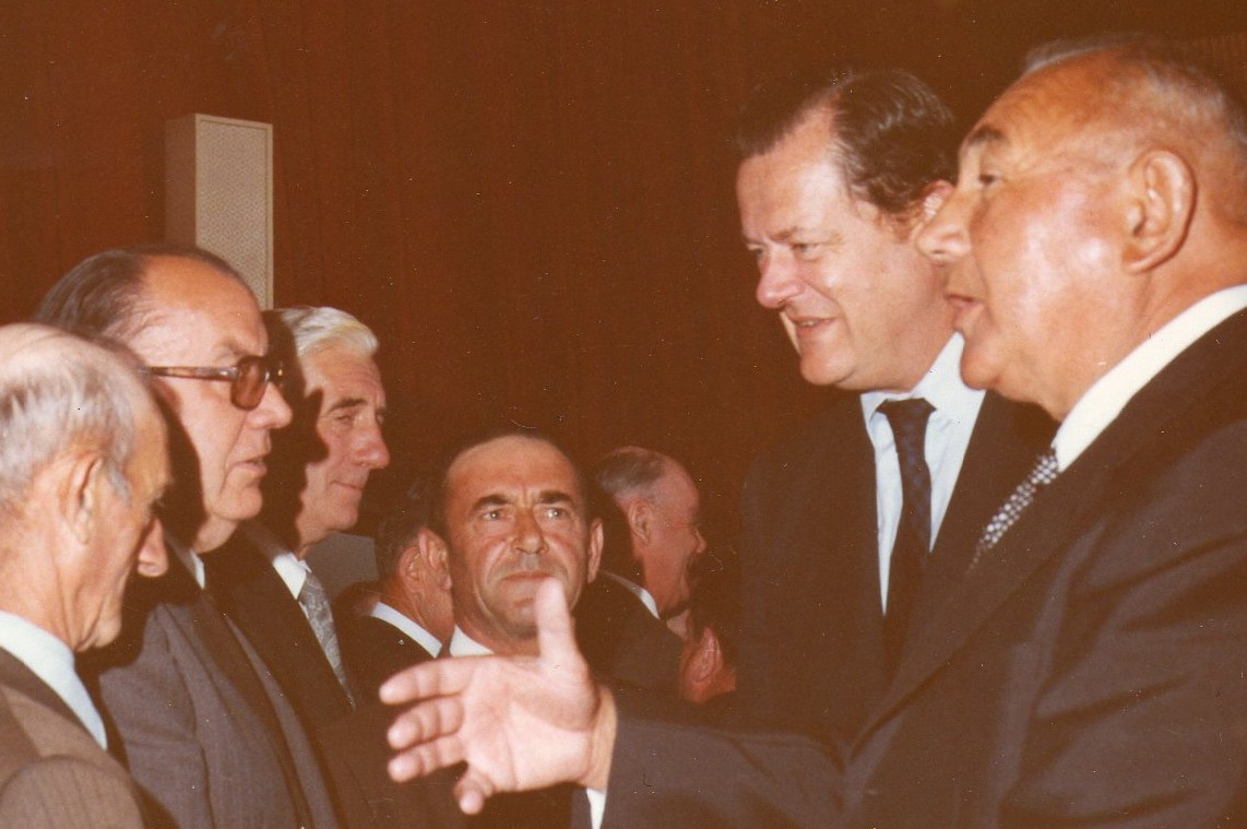 Raoul Vadepied sénateur-maire d'Evron